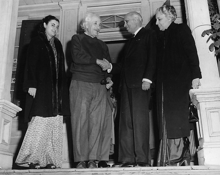 Indian Prime Minister Jawaharlal Nehru and his daughter Indira Gandhi visit Albert Einstein at the Albert Einstein House at 112 Mercer Street in Princeton, in 1949.